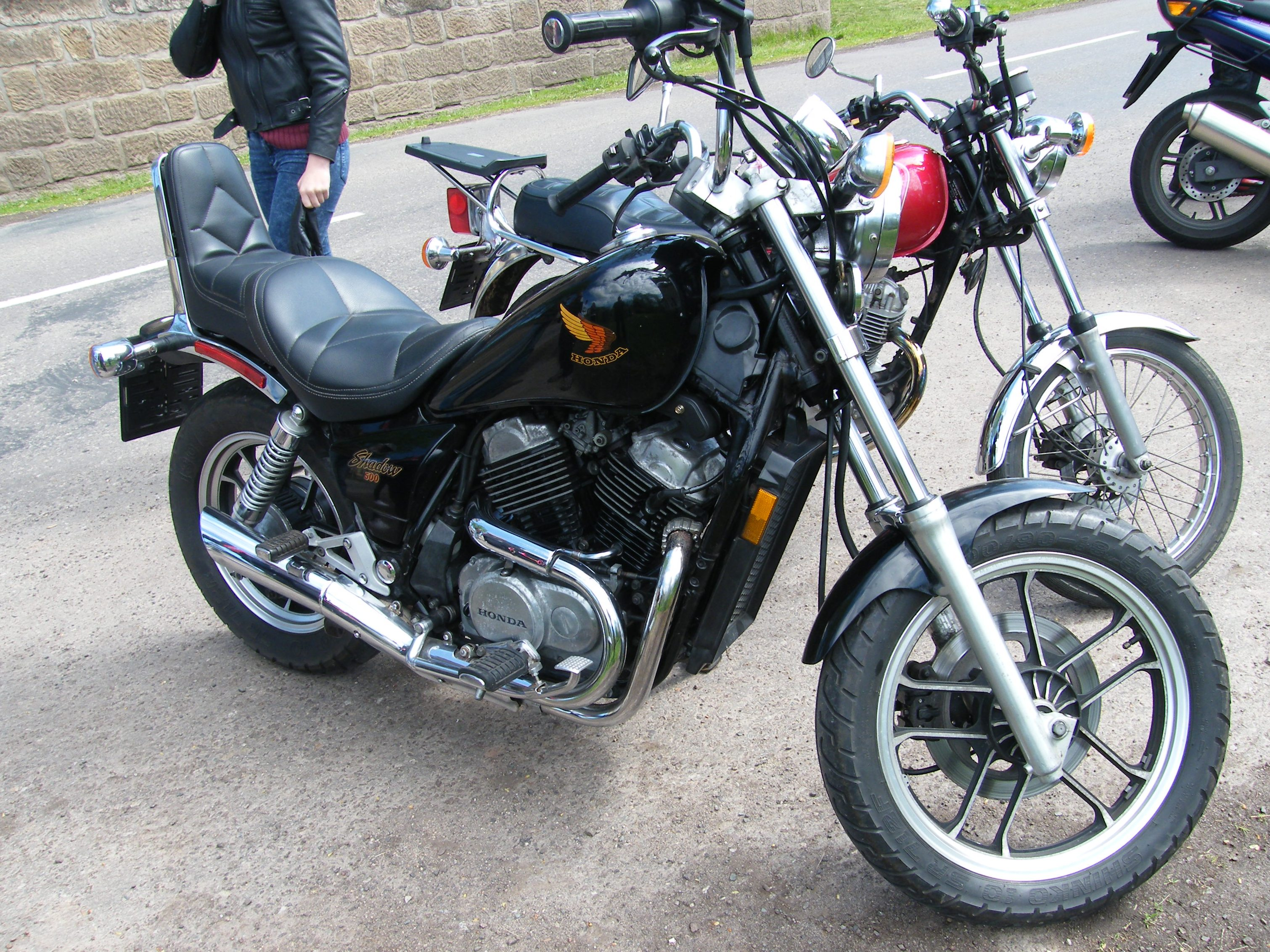 Honda VT 500 C Shadow